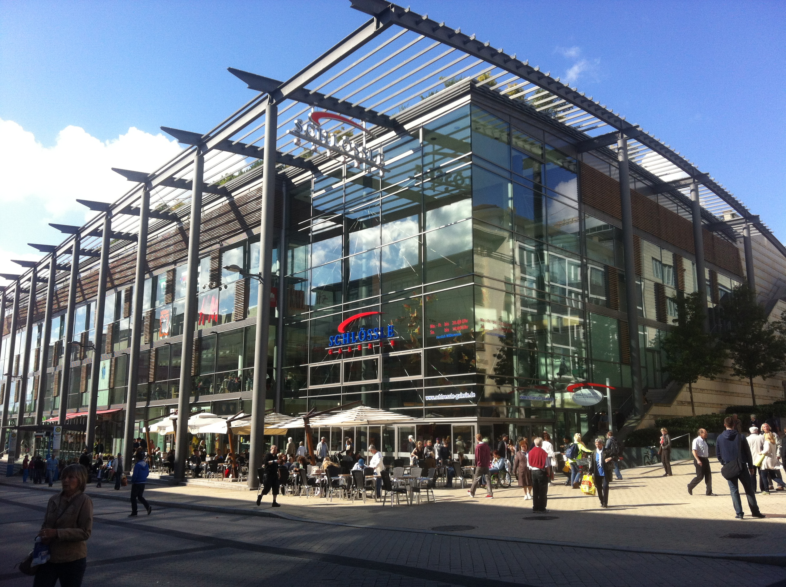 Schlössle Galerie Pforzheim pforzheim.de pz-news.de